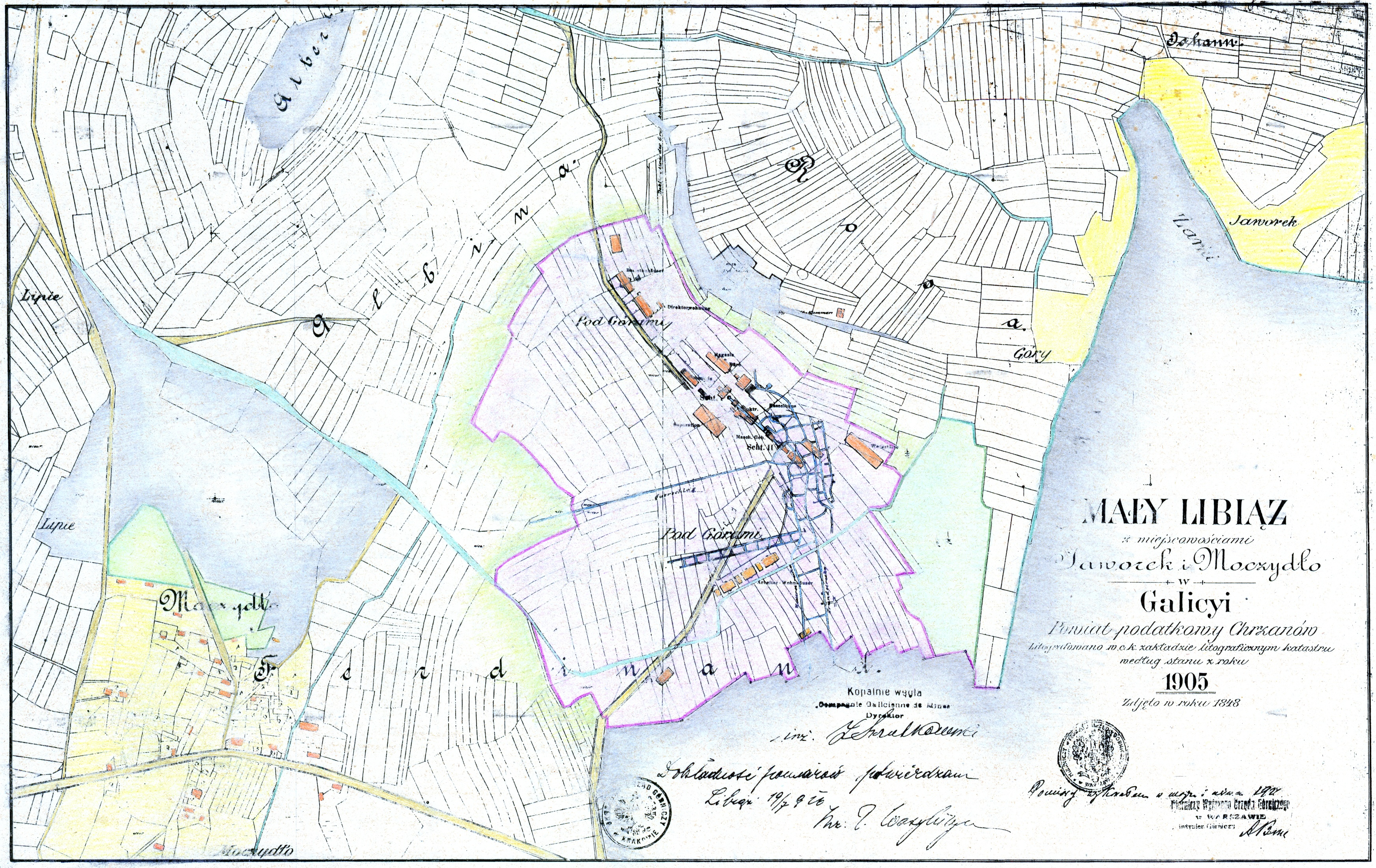 Mapa Libiąża z I poł. XX wieku z naniesionymi informacjami geodezyjnymi dotyczącymi powstającej tam kopalni "Janina". Na mapie widoczne podpisy zatwierdzających (dyr. Zygmunta Szczotkowskiego i inż. Wasyliszyna) i podpis mierniczego oraz stemple polskiego urzędu górniczego i mierniczego.